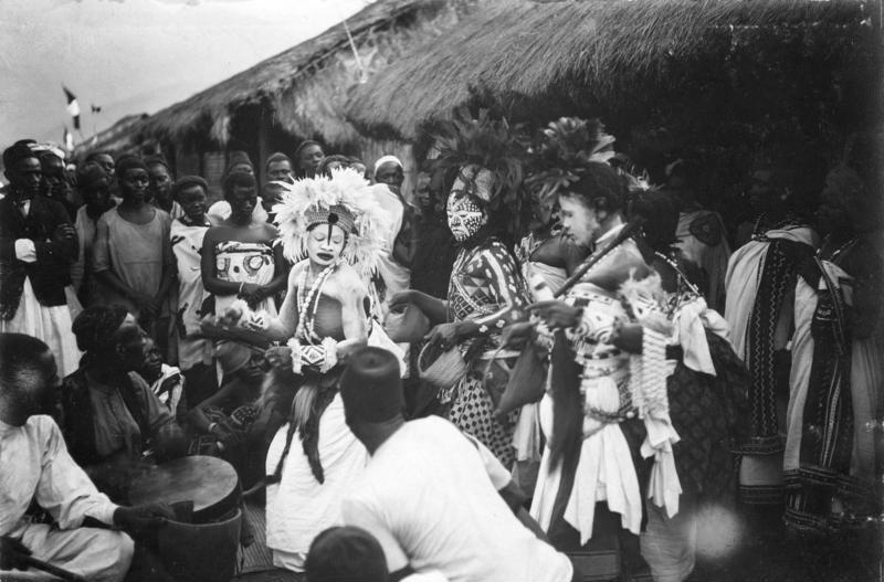 Exzellens Dernburg in Ostafrika Wanjema-Ngoma in Mrogoro